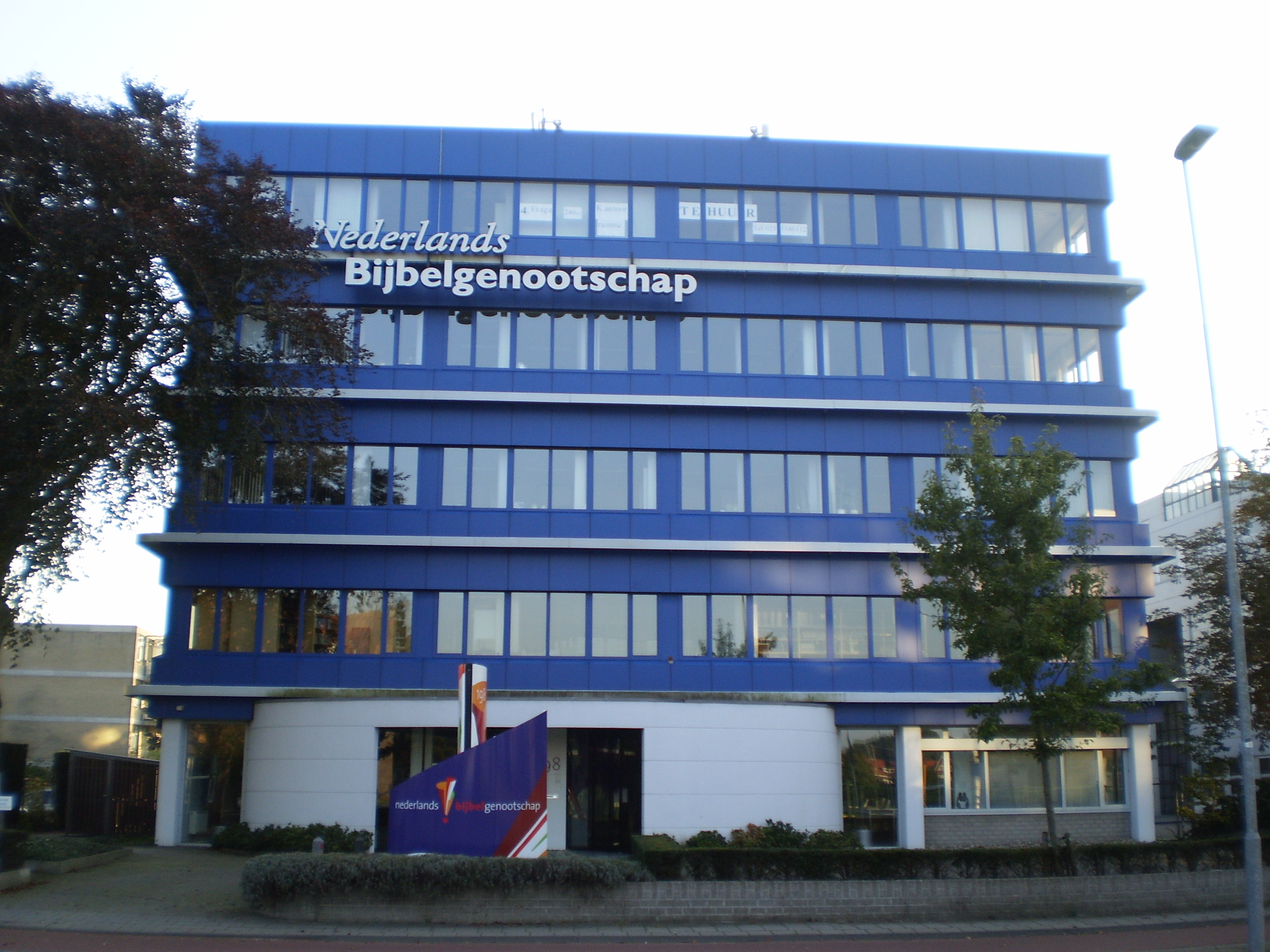 Hoofdkantoor Nederlands Bijbelgenootschap, Zijlweg, Haarlem, NL